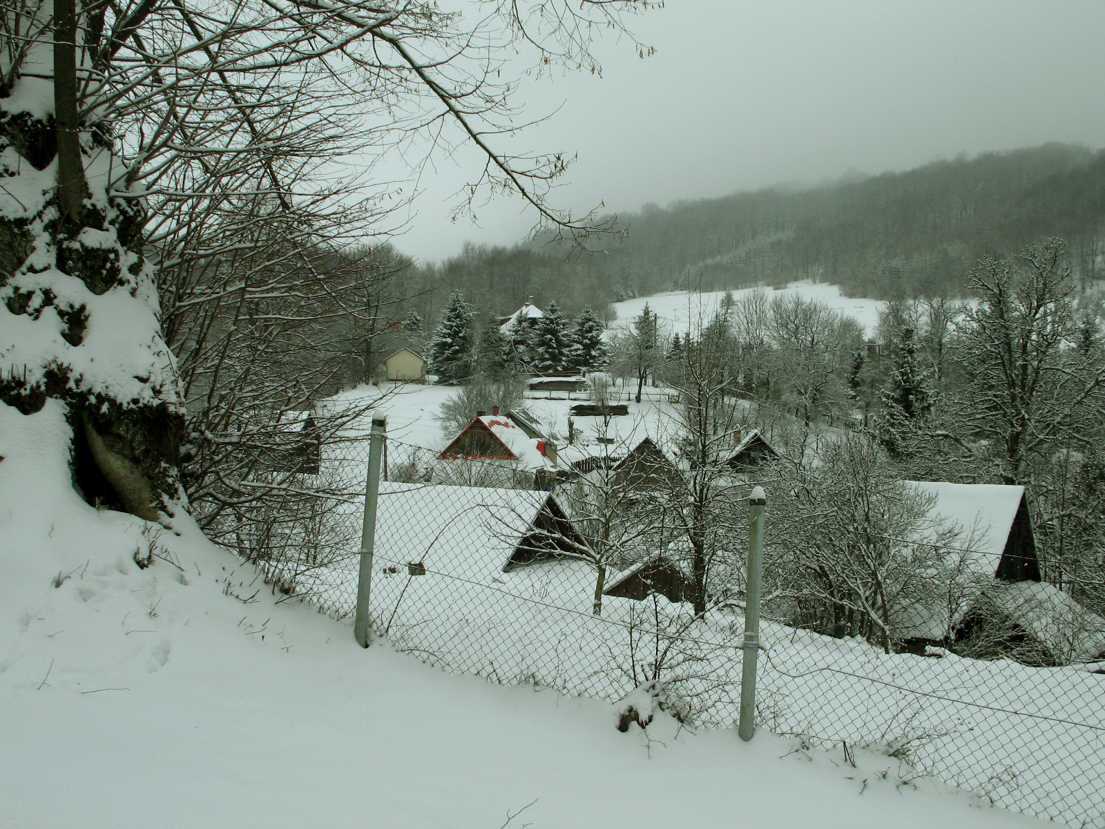 Zimná atmosféra